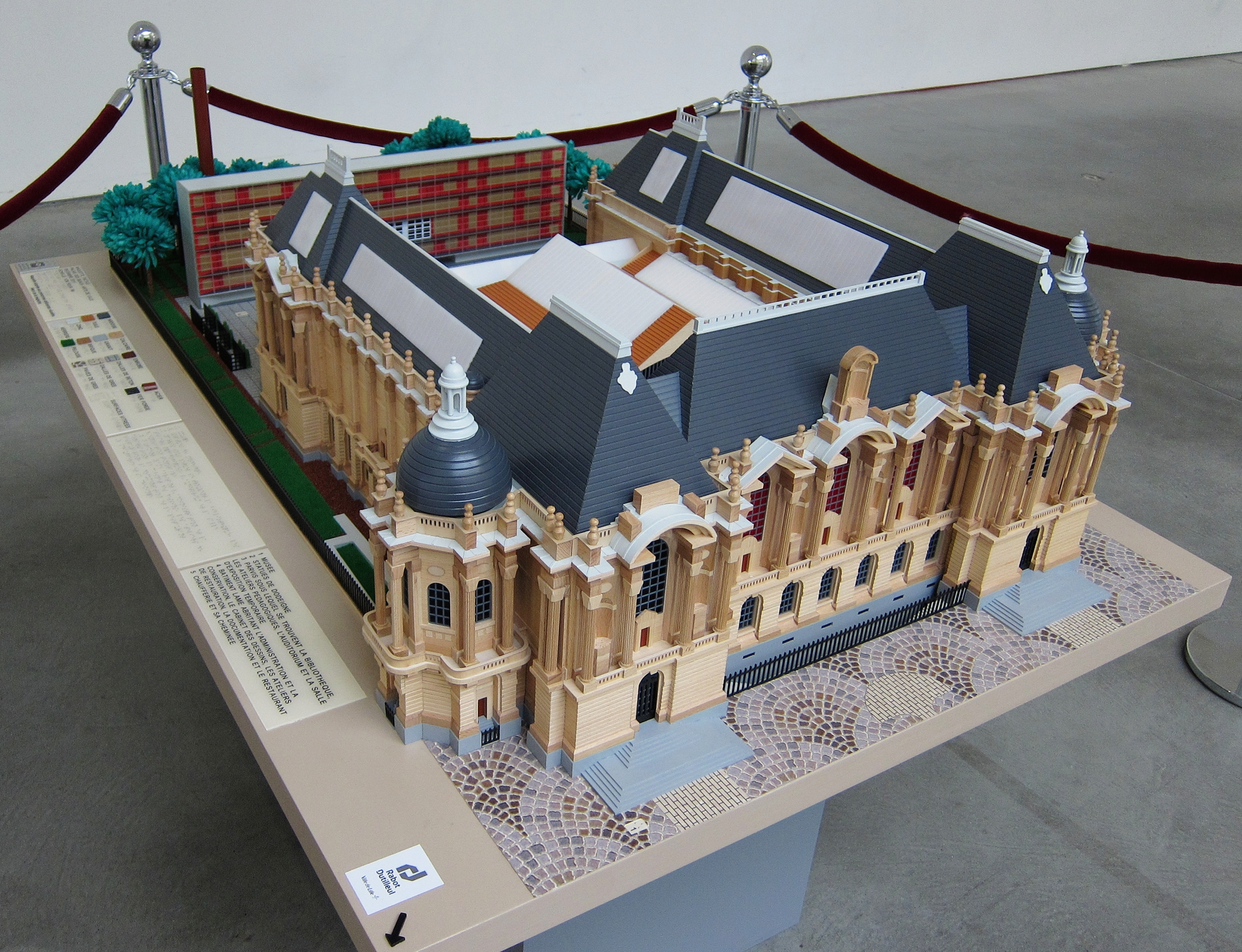 Maquette du Palais des Beaux-Arts de Lille.